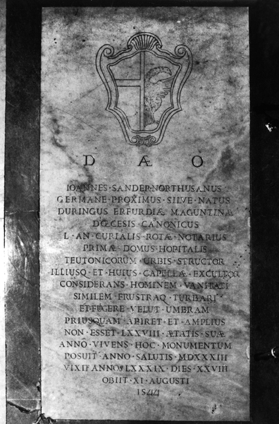 Erneuerte Grabplatte von 1744 des Rotanotars Johannes Sander in der Kirche Santa Maria dell’Anima in Rom.